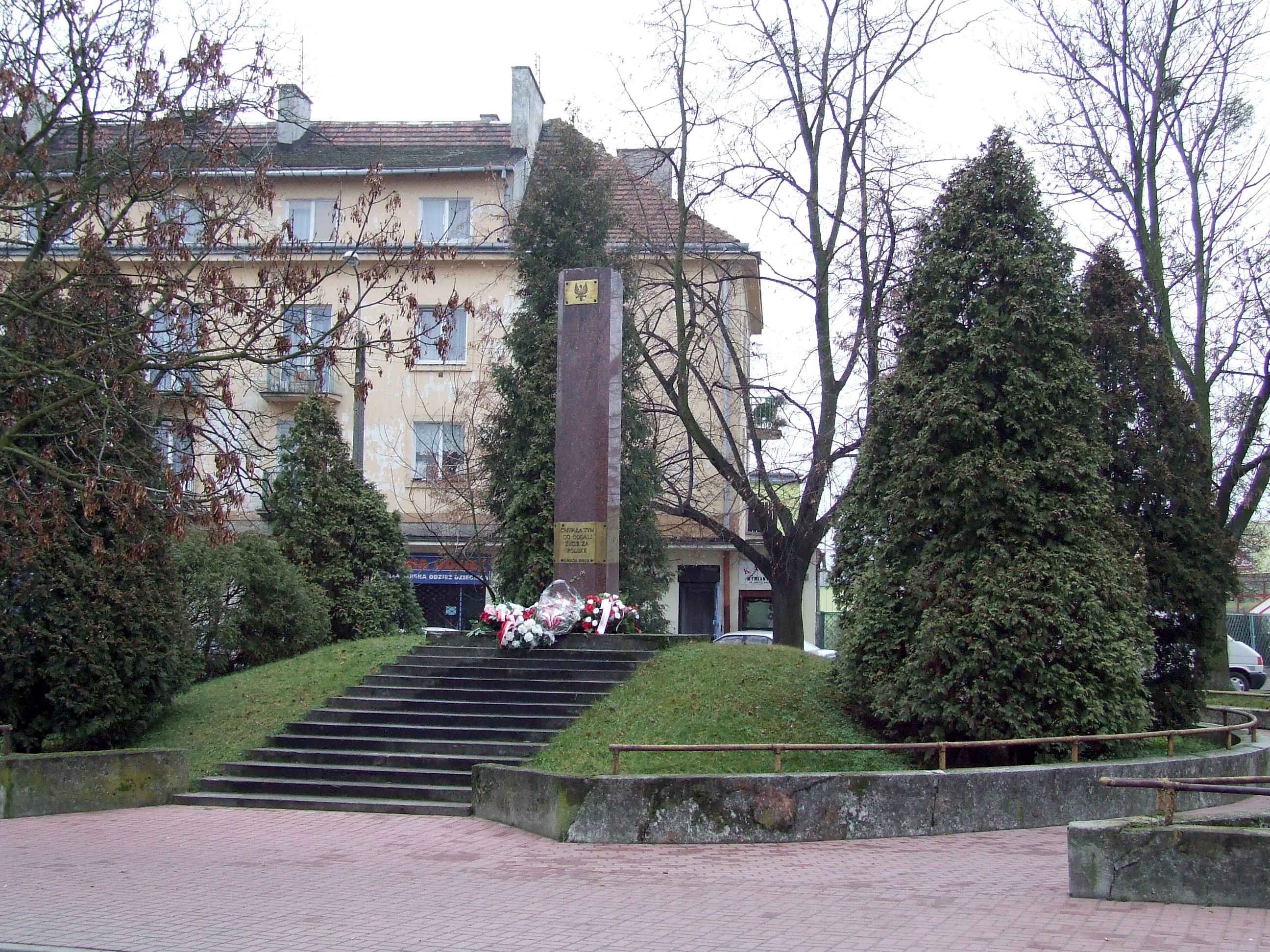 Nowy Dwór Mazowiecki, pomnik ofiar II w.św.